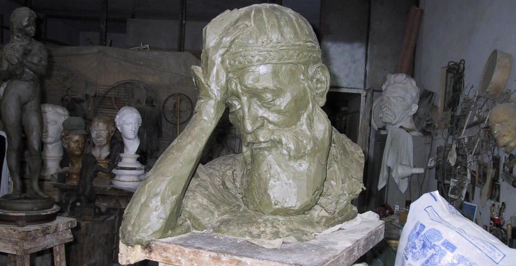 Физули (Магомед Сулейман оглы Физули), поэт и мыслитель XVI века, сыграл важную роль в становлении азербайджанской поэзии. Бюст Физули работы скульптора Ахмета Цаликова хранится в мастерской автора. Фотография предоставлена автором